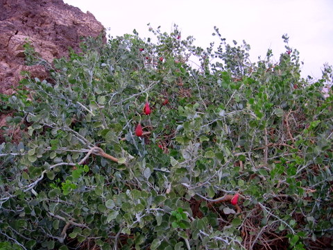 tzalaf.